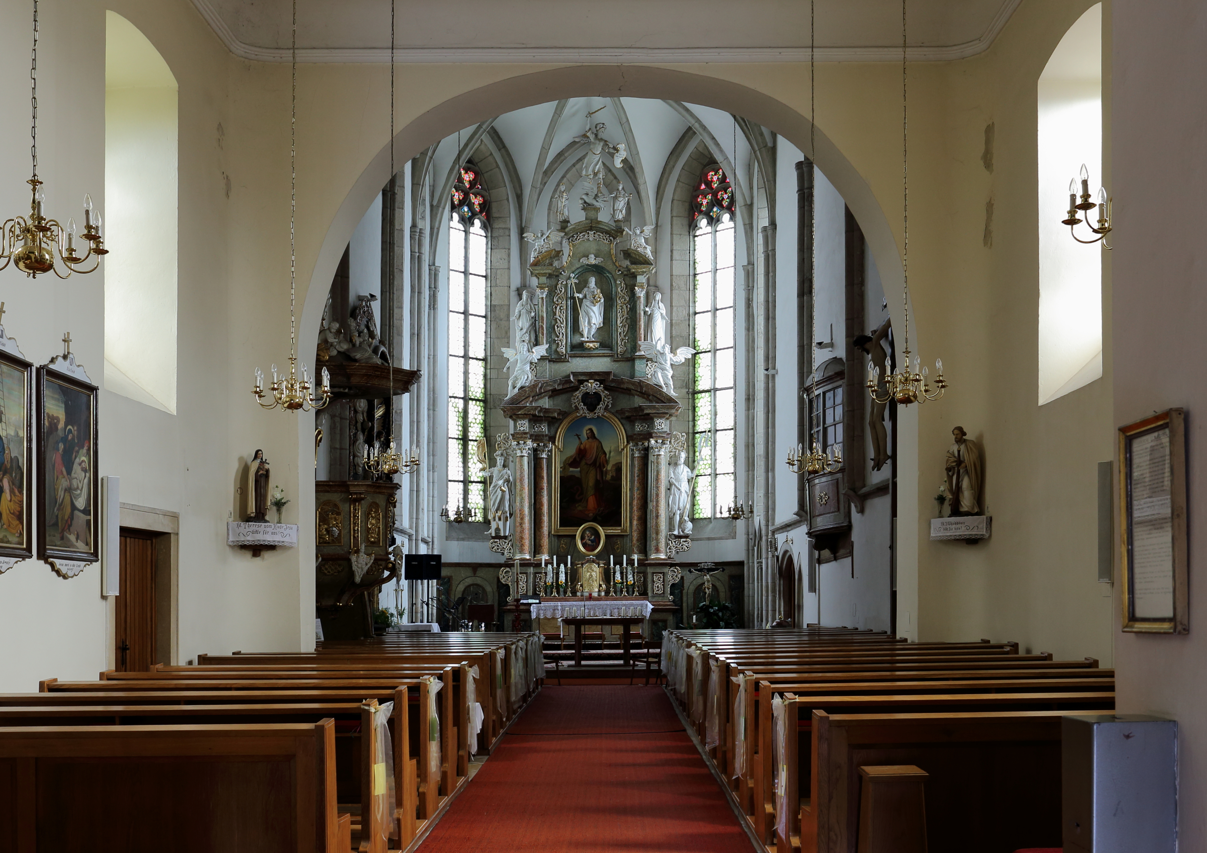 Innenansicht der Pfarrkirche hl. Margaretha in der niederösterreichischen Stadt Marchegg. Der mächtige, mehrfach veränderter Sakralbau mit dominierendem frühgotischem Chor aus dem 3. Viertel des 13. Jahrhundert war ursprünglich von einem Friedhof umgeben und befindet sich in der Stadtmitte. Die Kirche war 1268 als große dreischiffige Stadtpfarrkirche konzipiert. Nach schweren Zerstörungen durch den ersten österreichischen Türkenkrieg 1529 und 1634 (Schwedenkrieg) wurde nur der Chorbau als Kirche verwendet. Unter Karl Fürst Pálffy errichtete man 1789/90 das wesentlich kleinere Langhaus. Der zweigeschossige Westturm mit steilem Spitzhelm wurde 1855 errichtet.